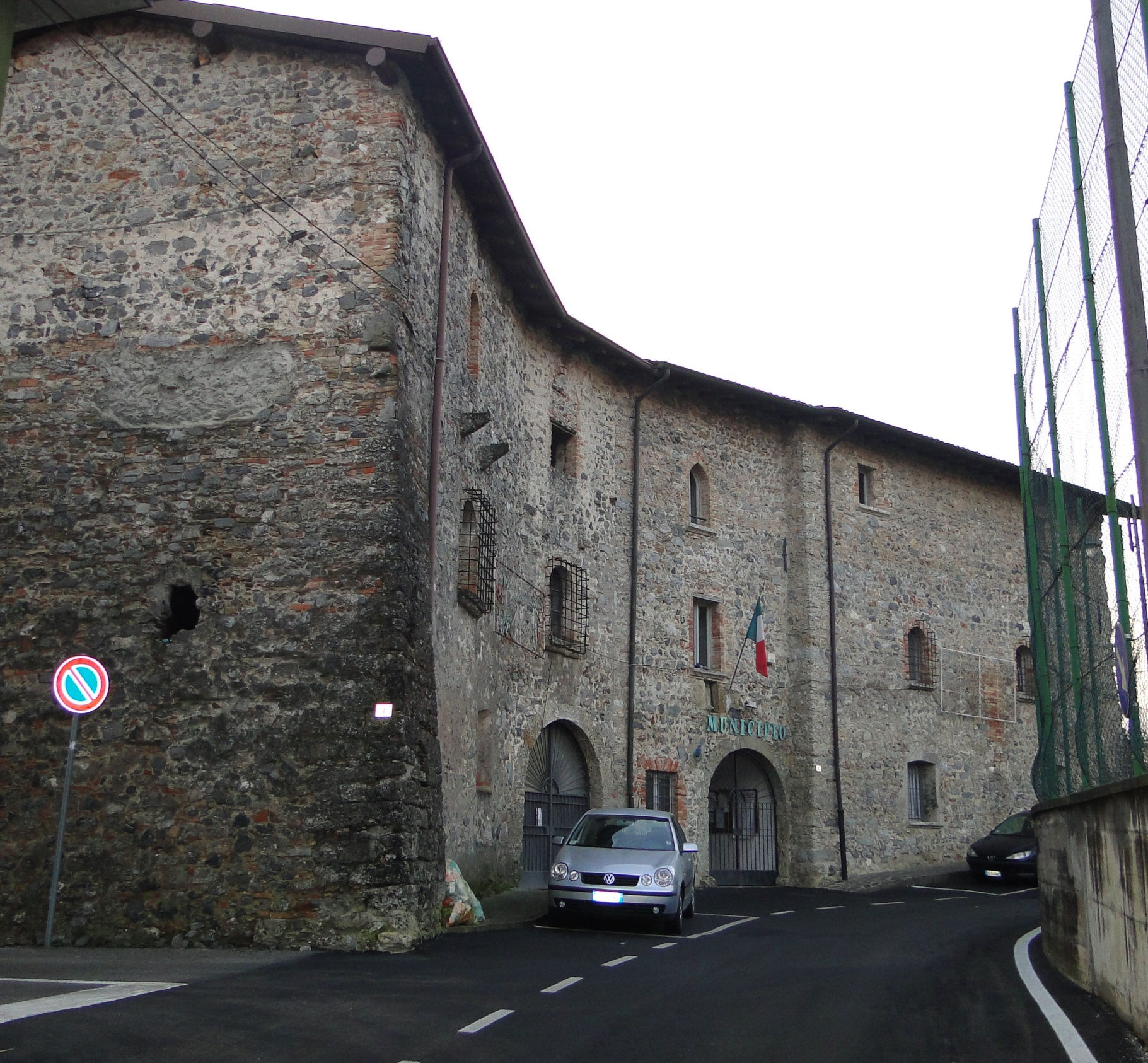 Torre di Cazzano Sant'Andrea (BG). Italy